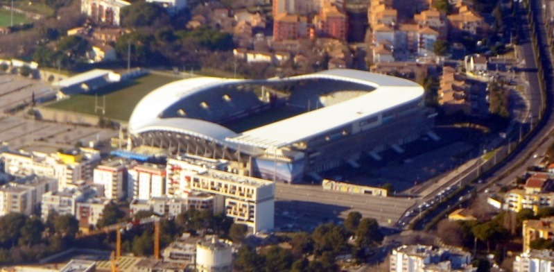 Stade Yves du Manoir de Montpellier